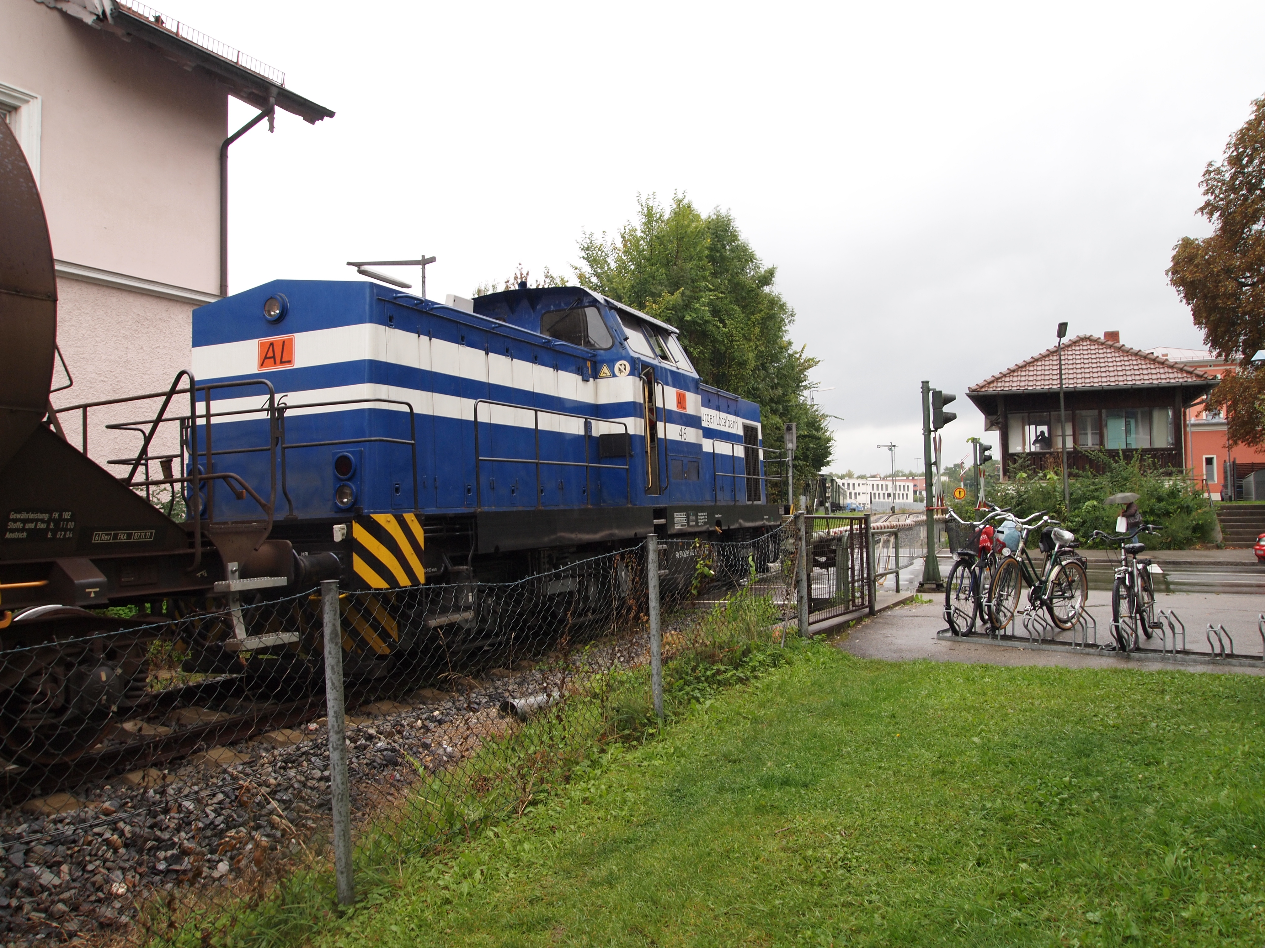 AL 46 (98 80 3293 903-1 D-AULOC), eine als BR 293 umgebaute V100 mit Güterwagen am Bahnübergang Katharinenstraße in Landsberg am Lech auf der Strecke Schongau-Landsberg am Lech kurz vor der Einfahrt in den Bahnhof Landsberg am Lech. Rechts im Bild das Stellwerk 2 des Bahnhofs Landsberg am Lech